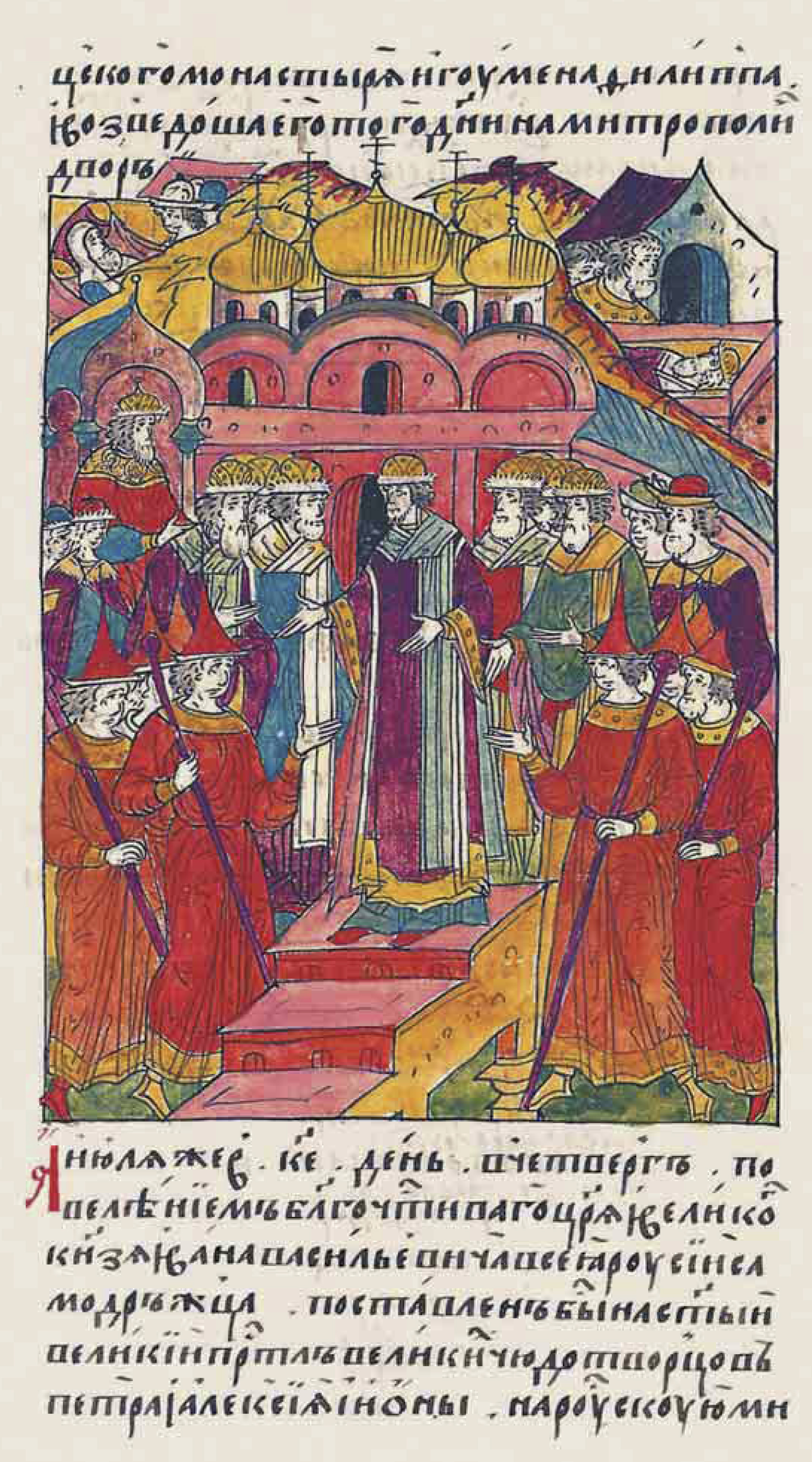 Лицевой летописный свод "И в июле же в 25 день в четверг повелением благоче- стивого царя и вели- кого князя всея Руси Ивана Васильевича самодержца поставлен был на святой вели- кий престол великих чудотворцев Петра, Алексия и Ионы на Русскую митрополию [игумен Соловецкий Филипп Колычев русскими архиеписко- пами и епископами: Пимином, архие- пископом Великого Новгорода и Пскова, Германом, архиепи- скопом Казанским и Свияжским, Ни- кандром, архиепи- скопом Ростовским и Ярославским, Еле- уферием, епископом Суздальским и Та- русским, Филофеем, епископом Рязан- ским и Муромским, Семионом,епископом Смоленским и Брян- ским, Варлаамом, епископом Коломен- ским и Каширским, Галактионом, еписко- пом Сарским и По- донским, Иоасафом, епископом Пермским и Вологодским, и всем освященным собором. А Полоцкий архие- пископ в то время скончался, а Тверской епископ Акакий был тогда в болезни, да к тому же стар был (и остался) в Твери, и с архиепископами и епископами с из- бранием митрополита был единомыслен. На поставлении же был царь и великий князь всея Руси Иван Васильевич и дети его царевич Иван и ца- ревич Федор и князь Владимир Андреевич.]"